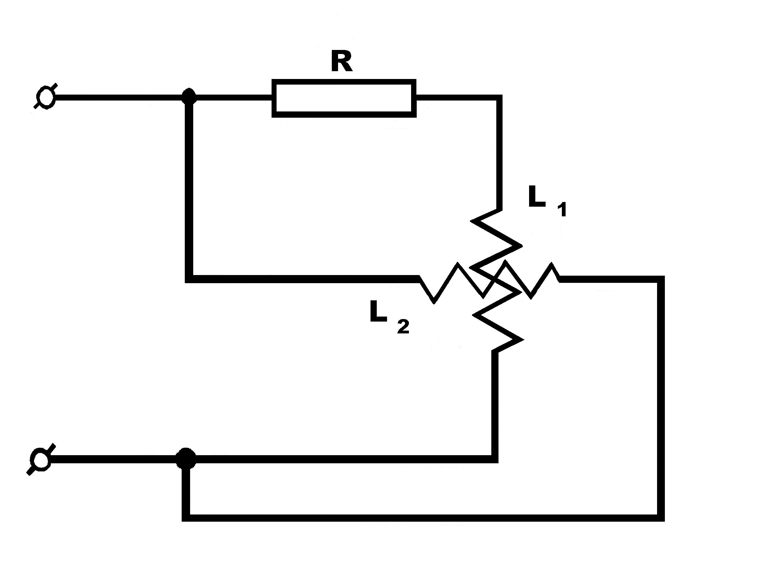 Схема соединения катушек для получения двухфазного вращающегося магнитного поля